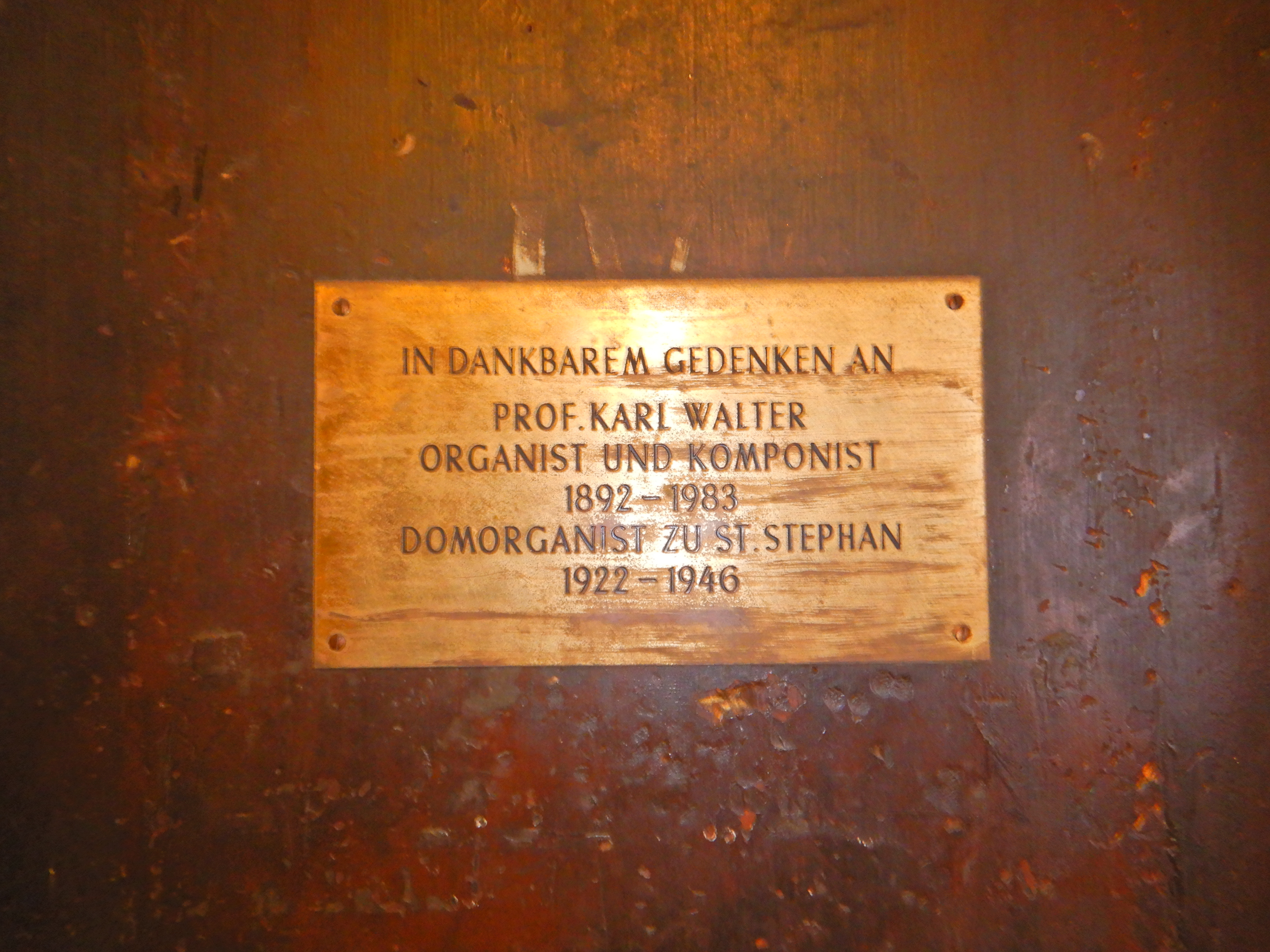 Gedenktafel für Karl Josef Walter (Wien, Stephansdom)